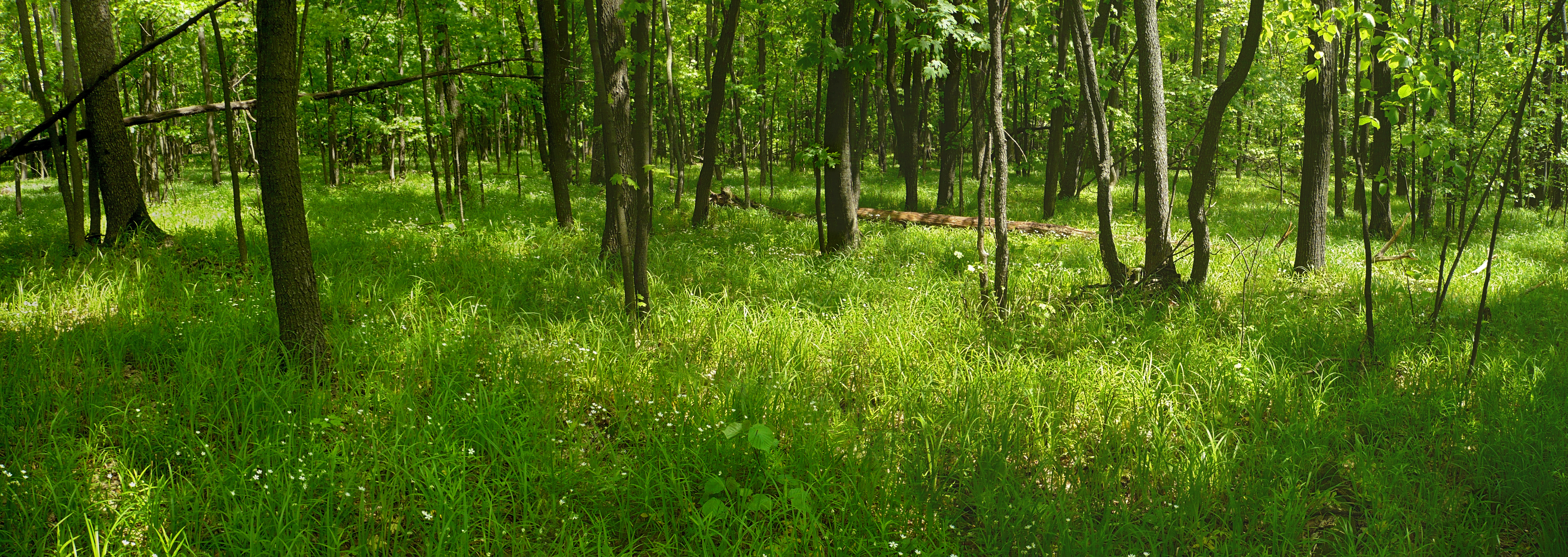 Лес в мае. Урочище близ хутора Гремячий и села Кошлаково. Шебекинский район Белгородской области. 2008 г.